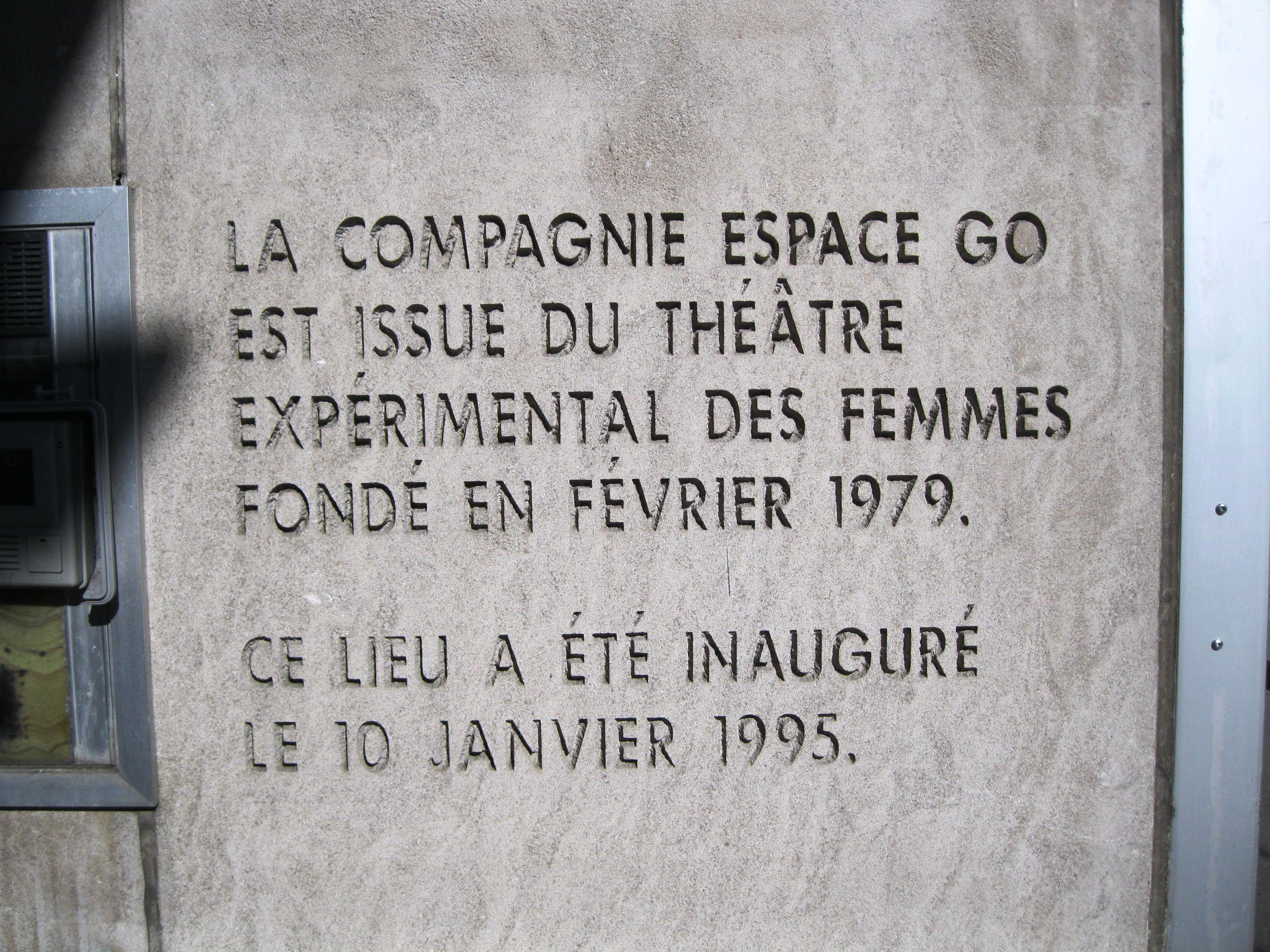 Texte gravé sur la façade du théâtre Espace Go : « La compagnie Espace Go est issue du Théâtre expérimental des femmes fondé en février 1979. Ce lieu a été inauguré le 10 janvier 1995. »